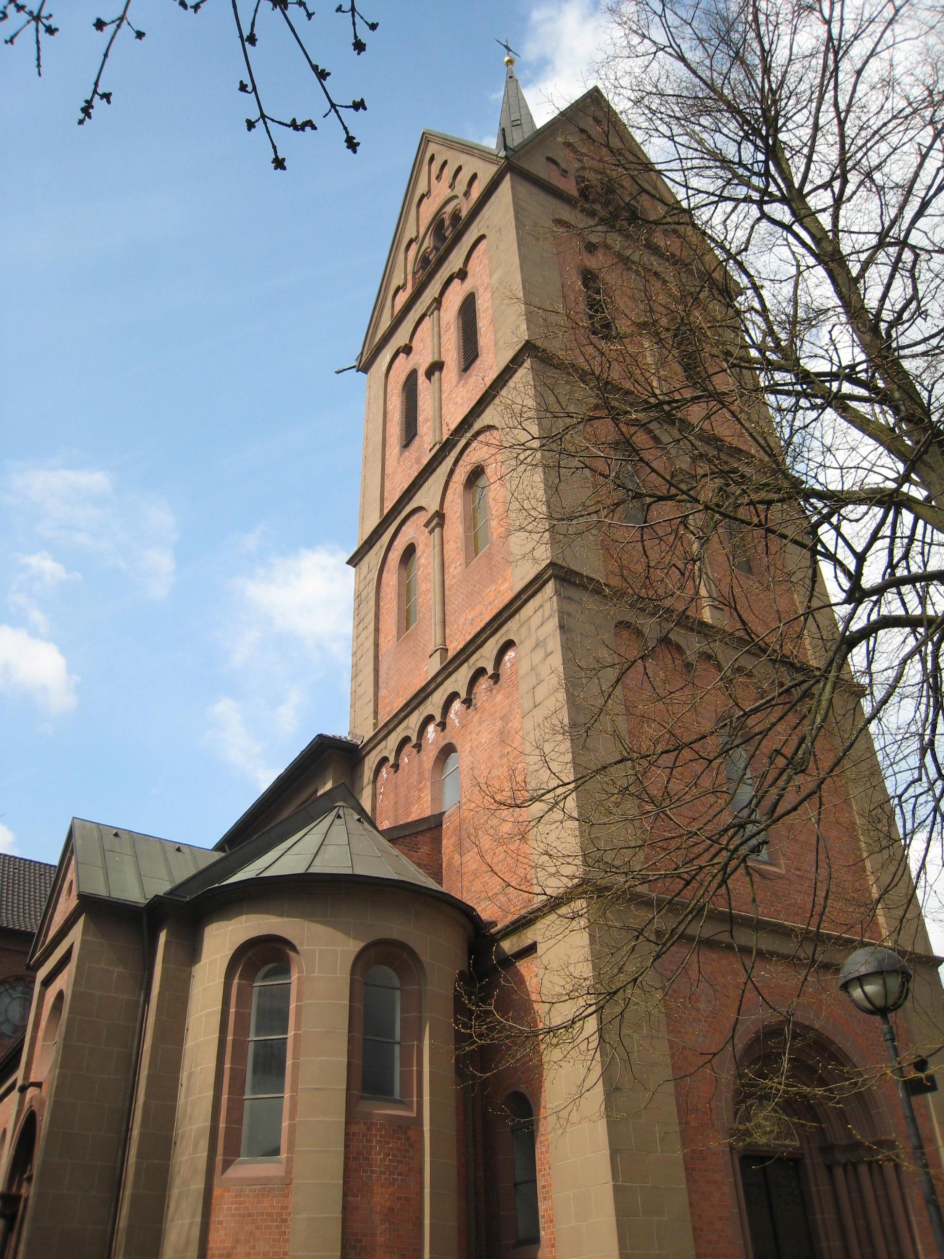 katholische St. Barbarakirche Dortmund-Dorstfeld